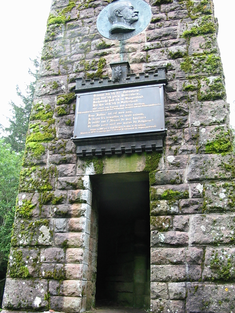 Commune de Urbeis (Bas-Rhin) : tour bâtie au sommet du Climont.